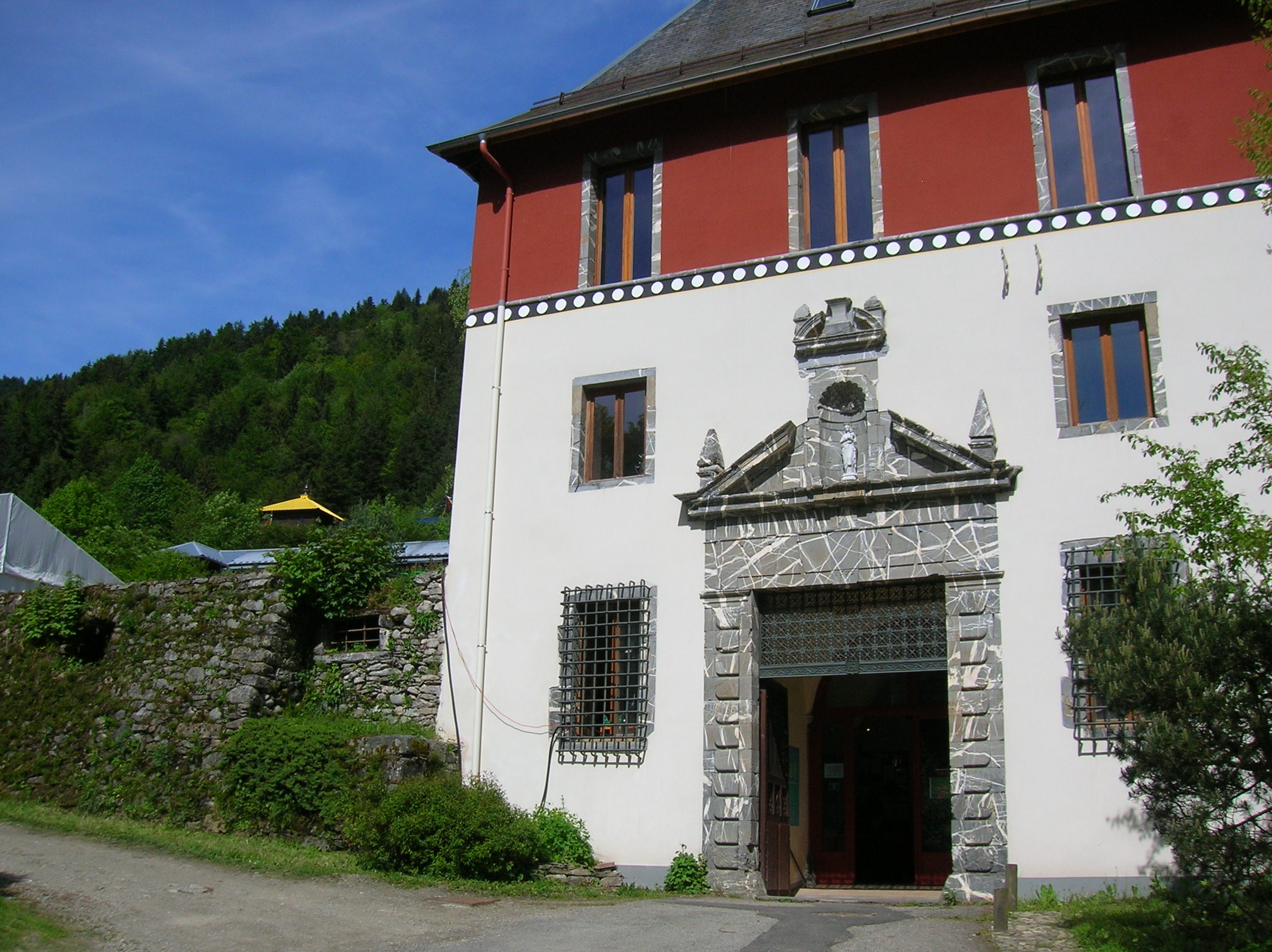 Entrée. Première journée de "HARMONIE DES STEPPES", Festival culturel mongol de l'Institut Karma Ling. Chartreuse de Saint Hugon, Hameau de Saint Hugon, Arvillard, Isère, AuRA, France.